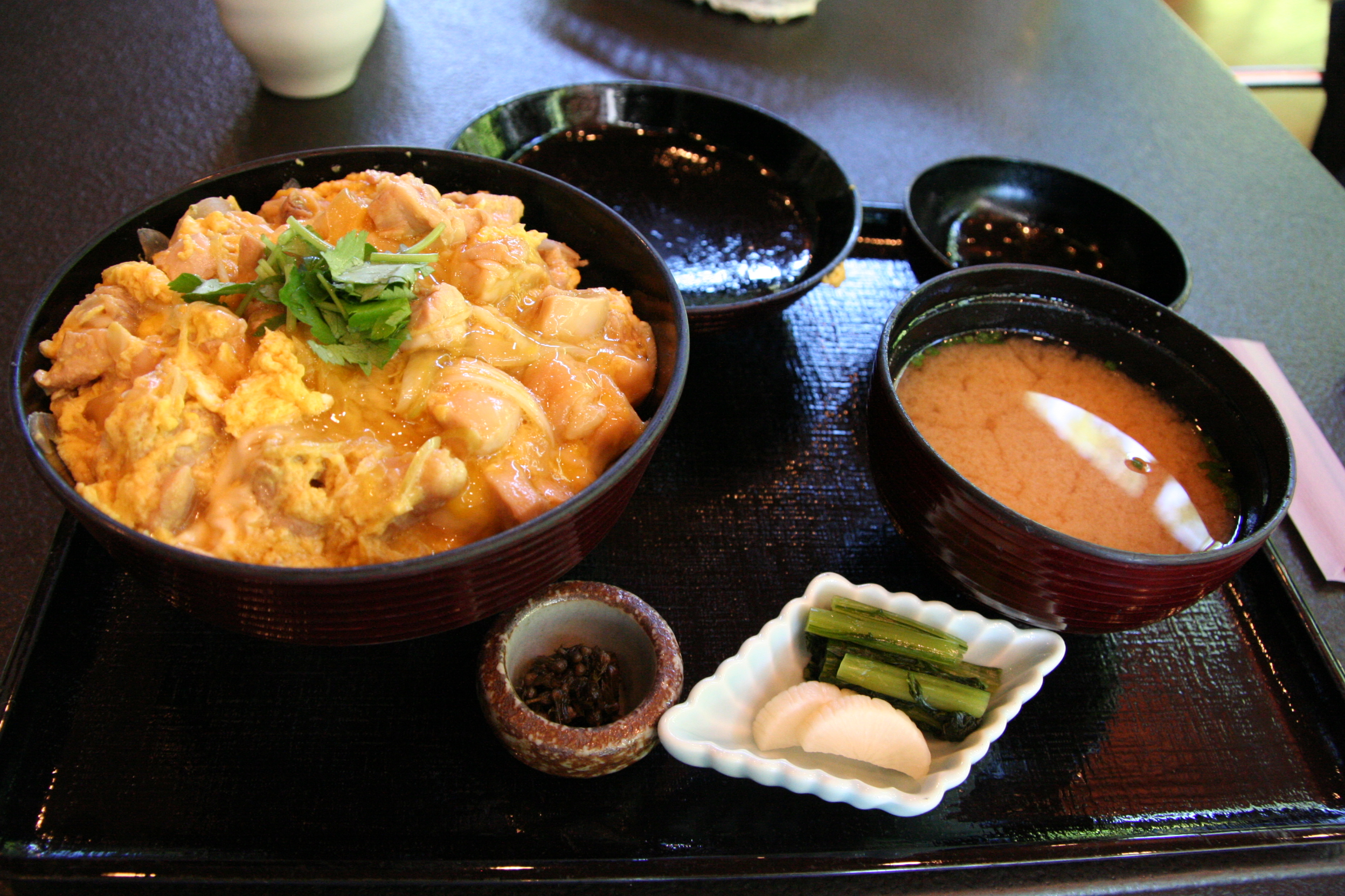 親子丼@村民食堂